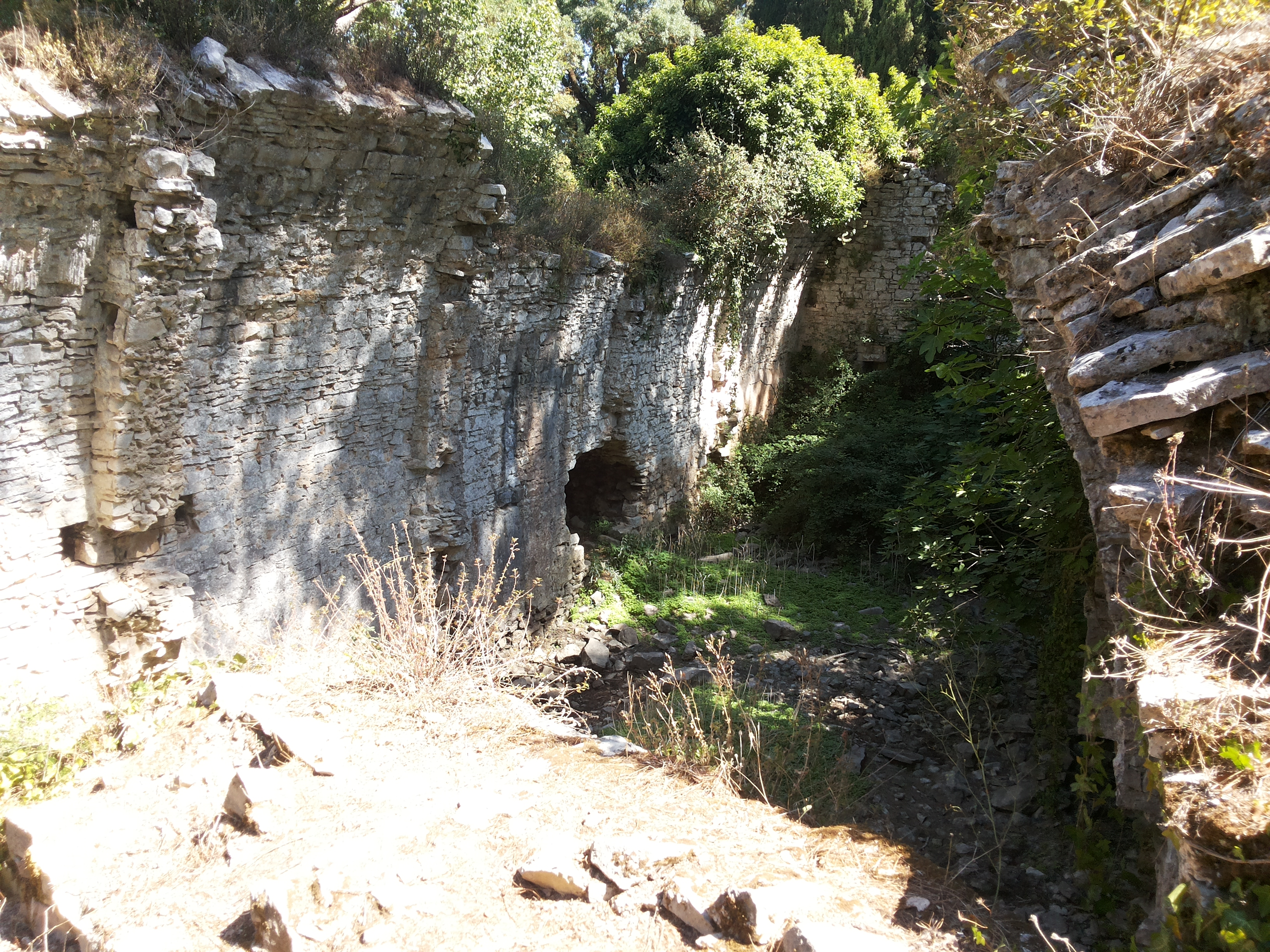 La Funtanazza (Monte Bonifato, Alcamo)